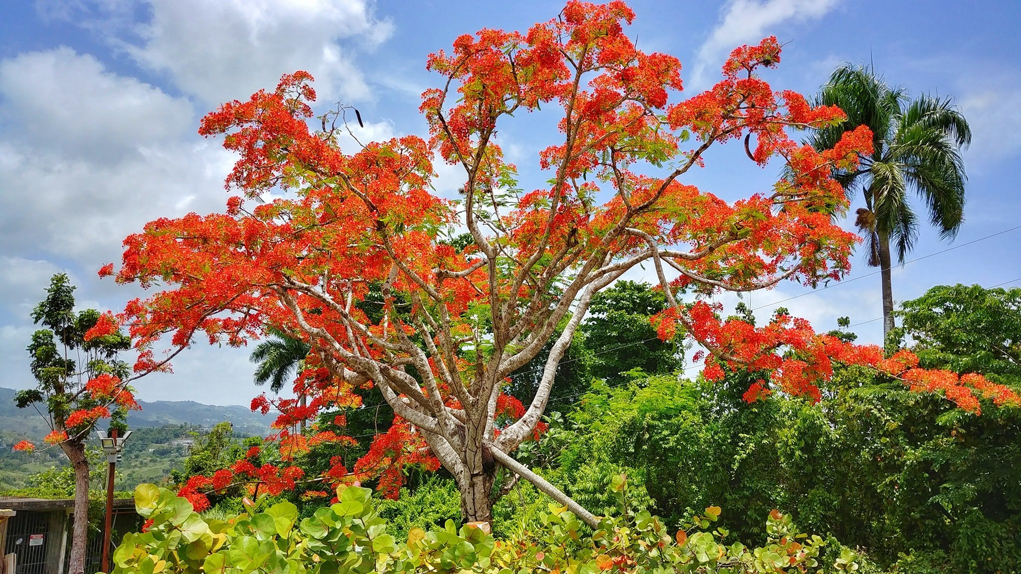 Barrio Pueblo, Corozal, Puerto Rico (2019)